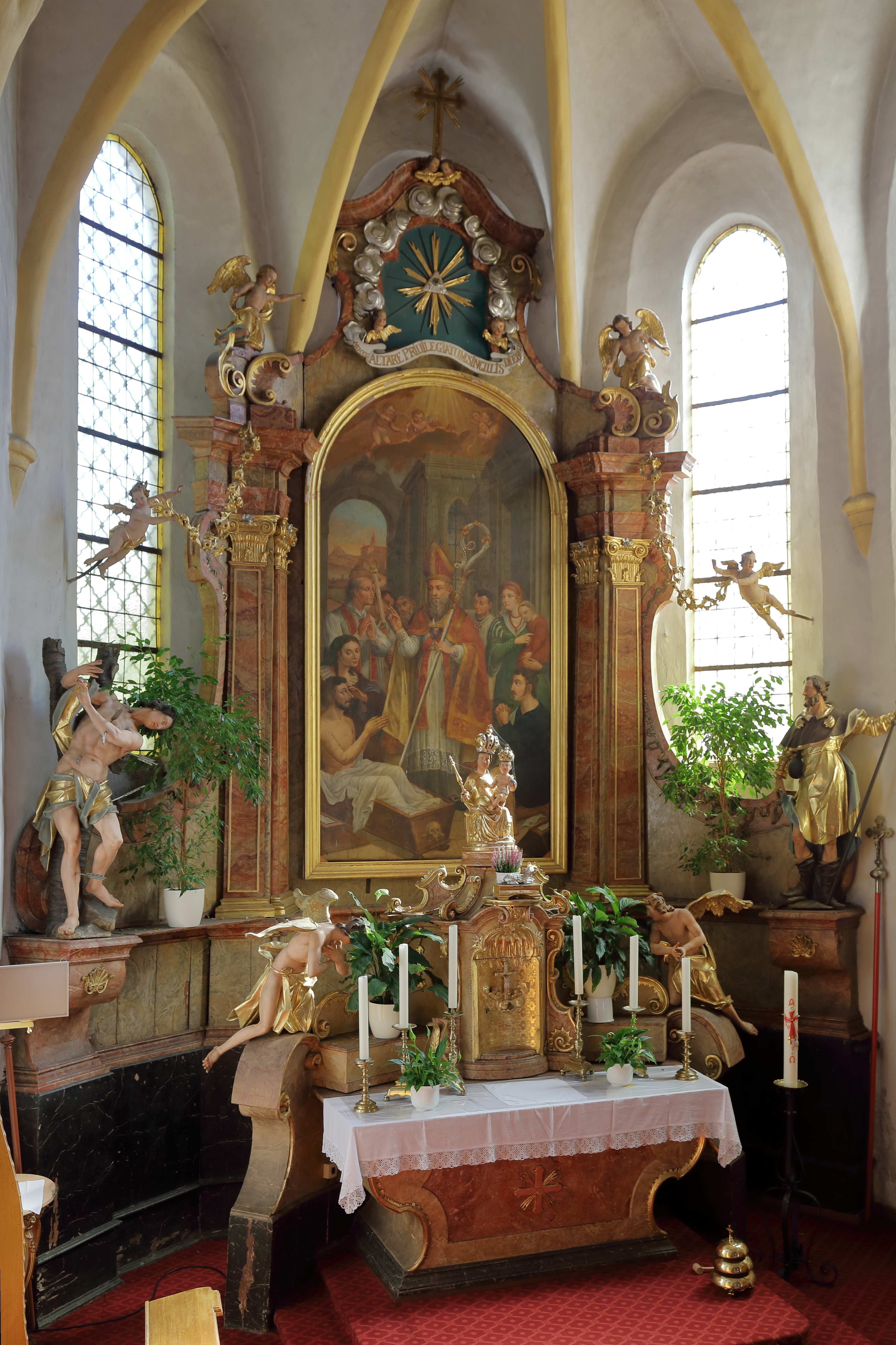 Hochaltar der röm.-kath. Pfarrkirche hl. Martin in der niederösterreichischen Marktgemeinde Marbach an der Donau.Der Hochaltar wurde 1747 vom Bildhauer Franz Schuester aus Wien und dem Maler Thomas Fürst aus Marbach gefertigt. 1838 wurde das Altarbild mit dem Motiv hl. Martin erweckt einen Toten ersetzt.